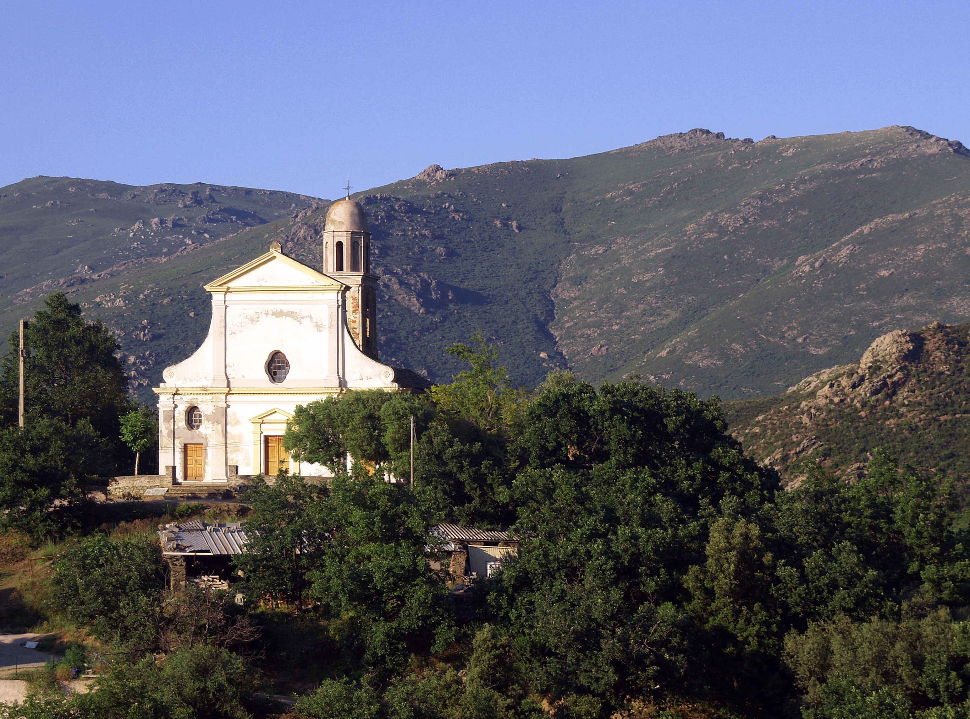 Vallecalle, Nebbio (Haute-Corse) - Église Saint-Paul (San Paolo)